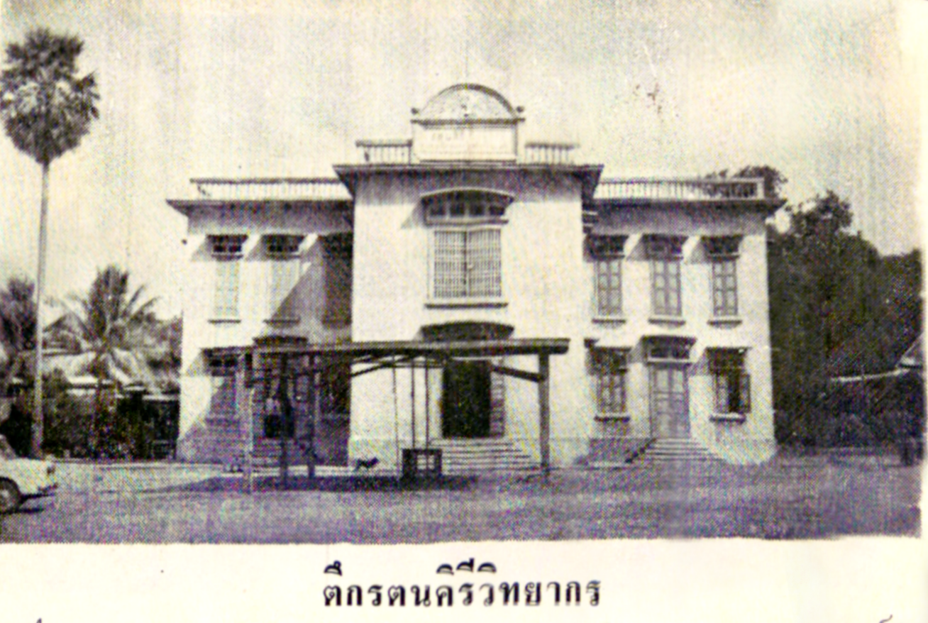 อาคารเรียนปริยัติศึกษาหลังแรกของวัดเขาแก้ว